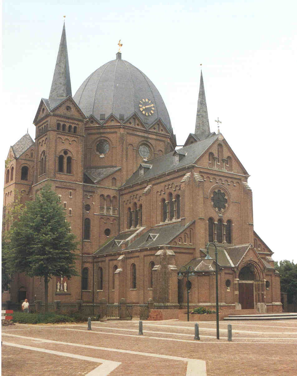 De koepelkerk te Lierop, gemeente Someren.